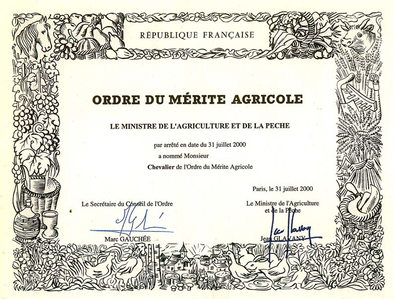 Diplôme du Mérite agricole Scan Jean Tosti Jean Tosti 10/2004